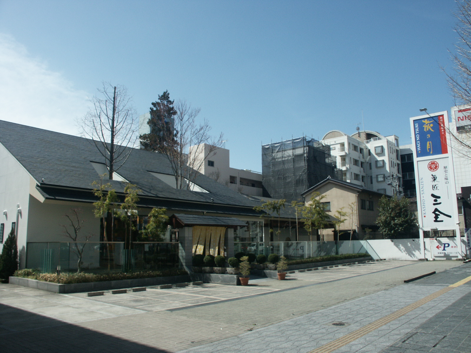 仙台市青葉区にある菓匠三全本社